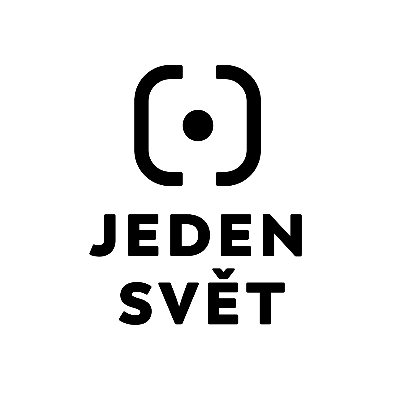 Logo festivalu Jeden svět používané od roku 2018.